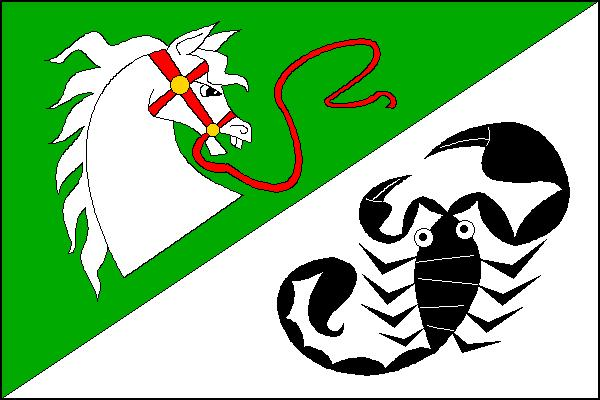 Vlajka obce Nehodiv